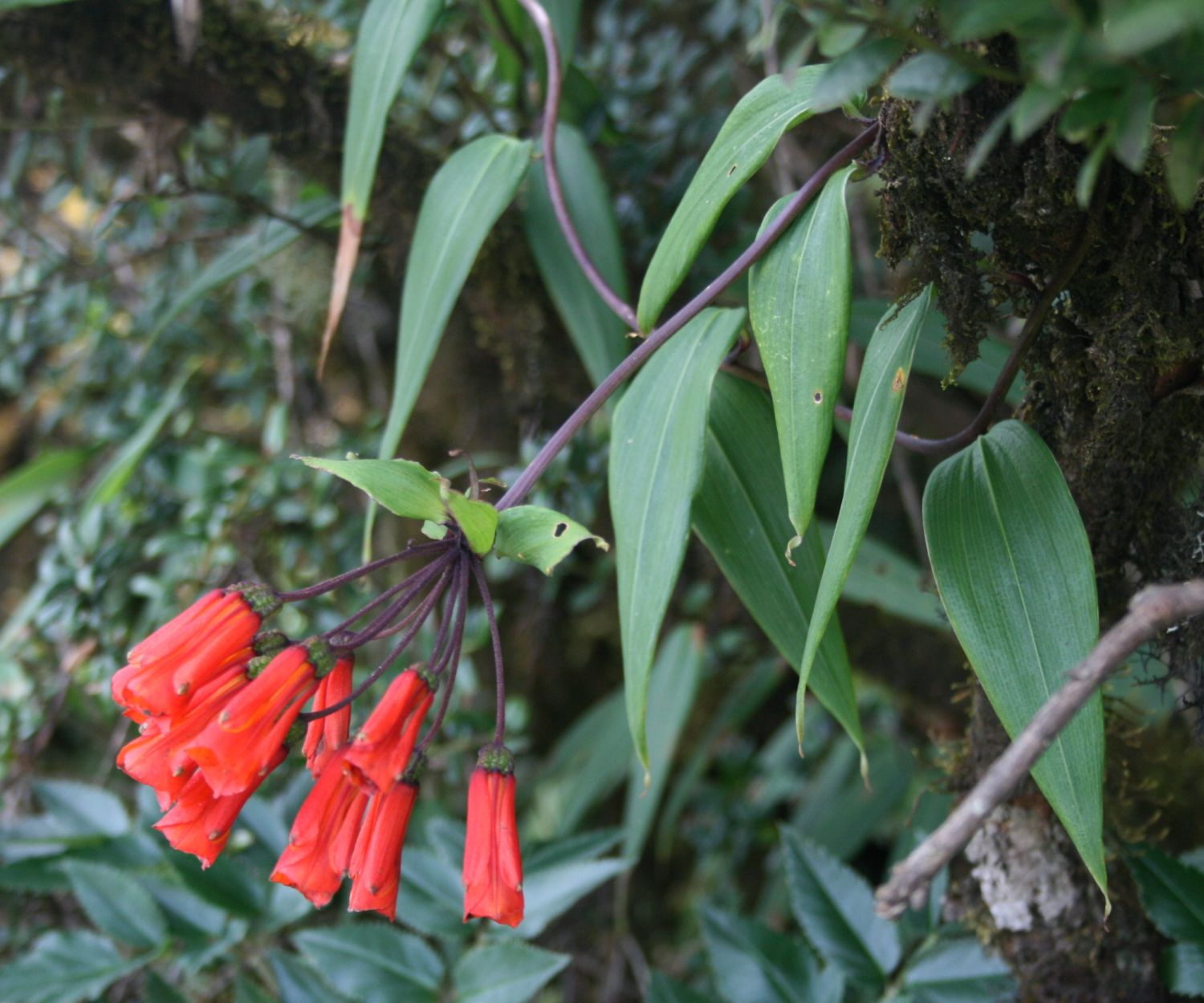 Bomarea costaricensis, Alstroemeriaceae - Costa Rica: Prov. Cartago, Cordillera de Talamanca, Carretera Interamericana N Cerro de la Muerte, ca. km 86, ca. 3150 m